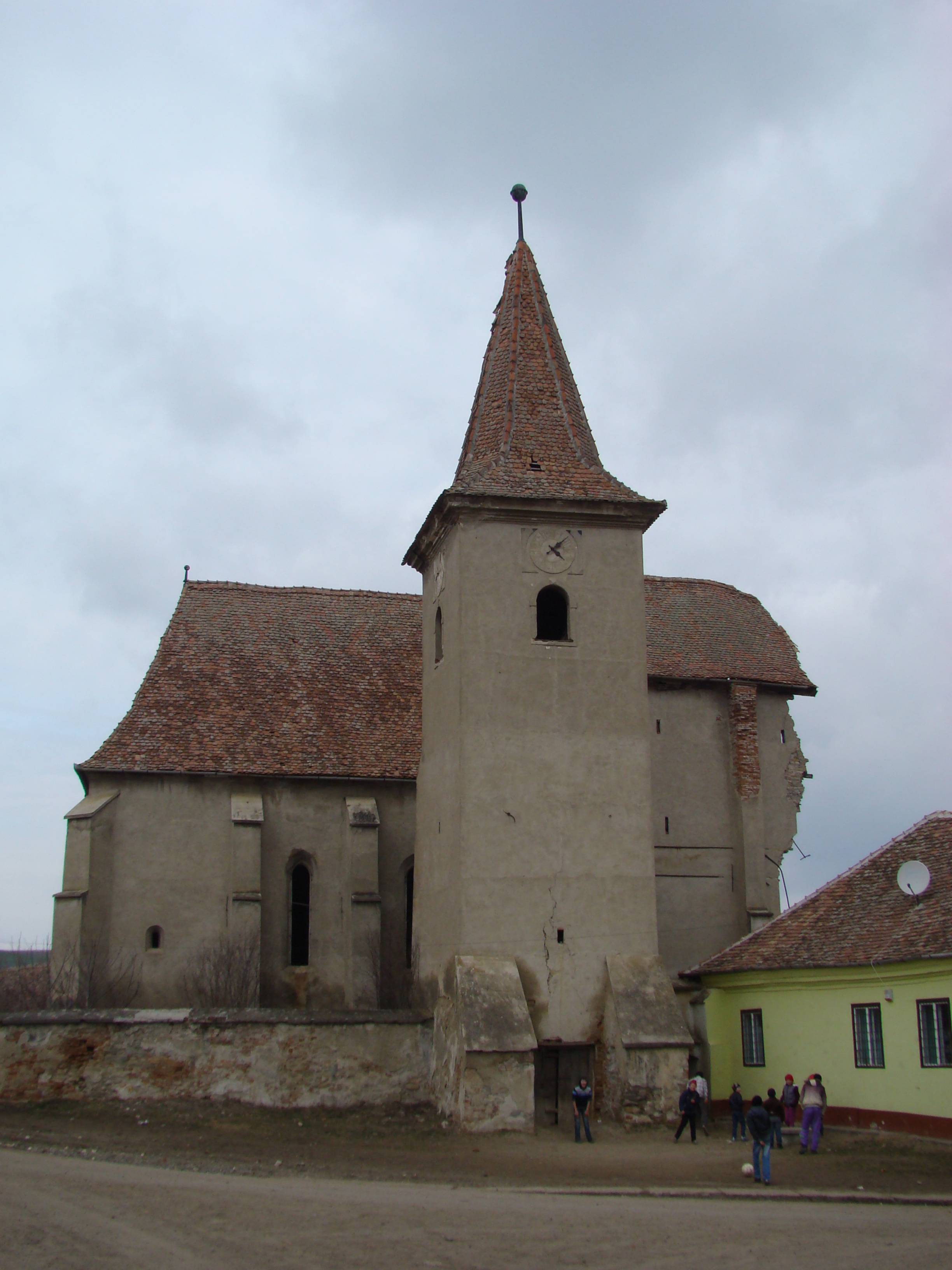 Biserica fortificată din Velţ